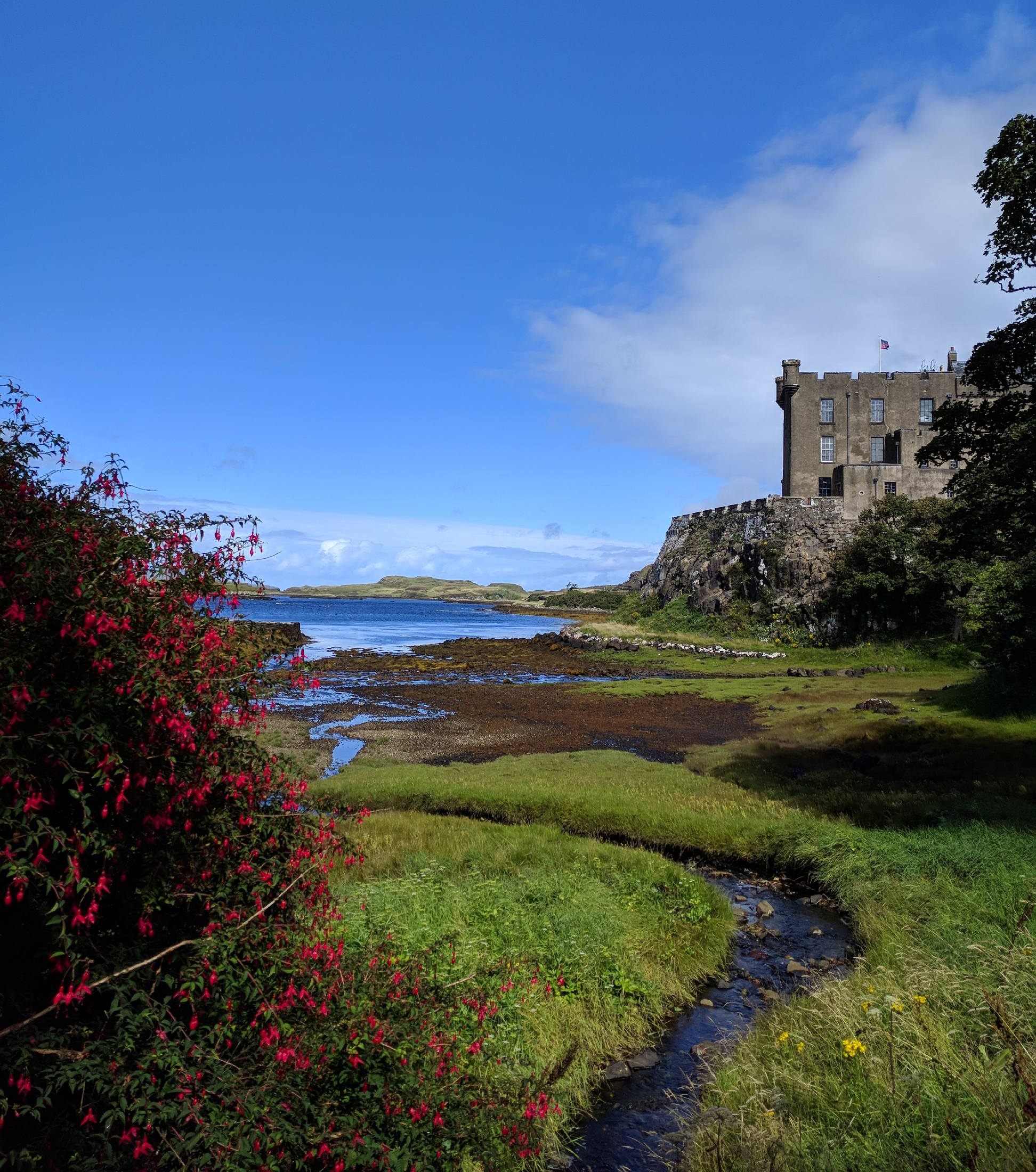 Flowers blooming outside Dunvegan Castle during summer